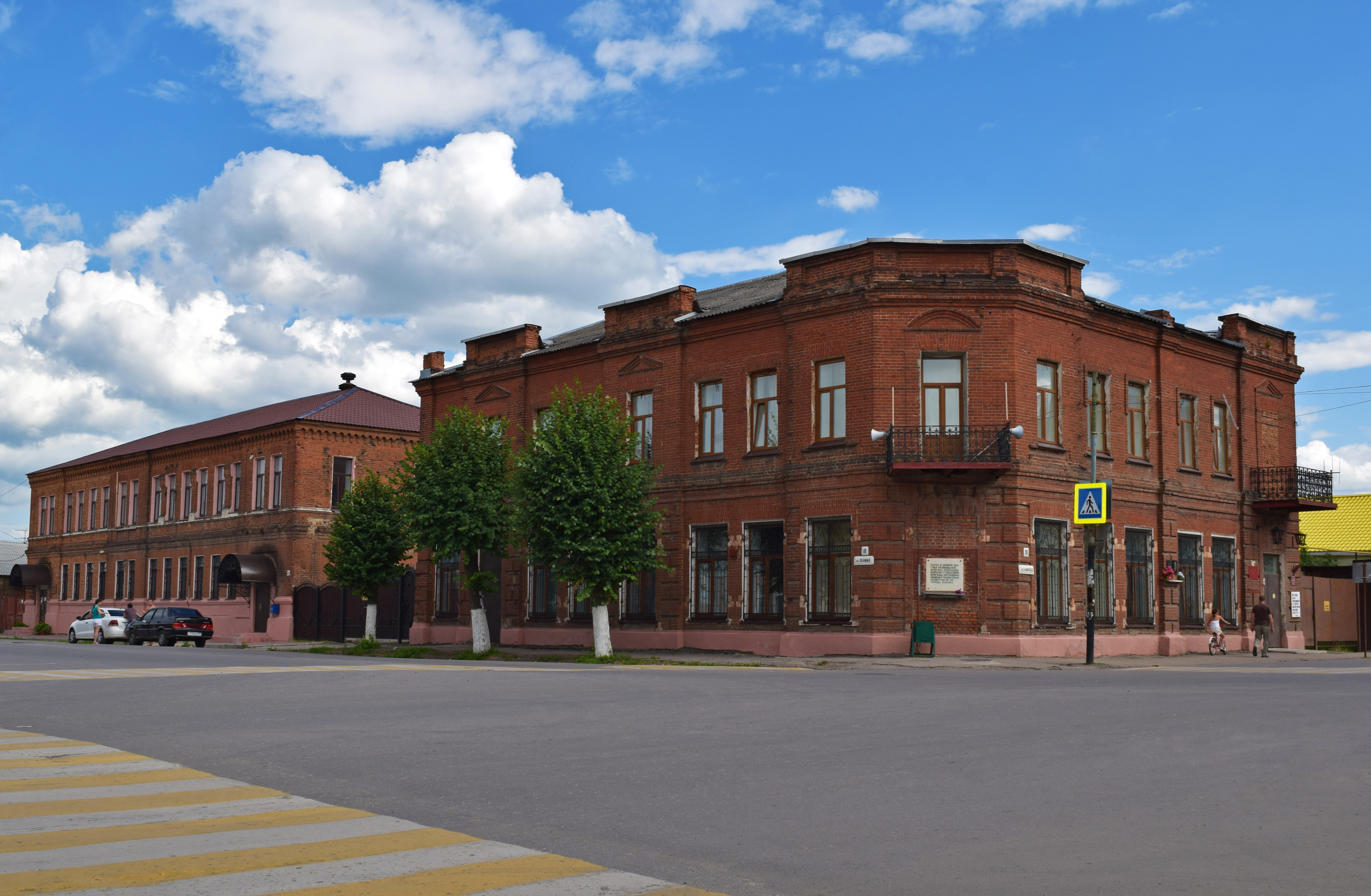 Скопинский краеведческий музей, центр промыслов и ремёсел